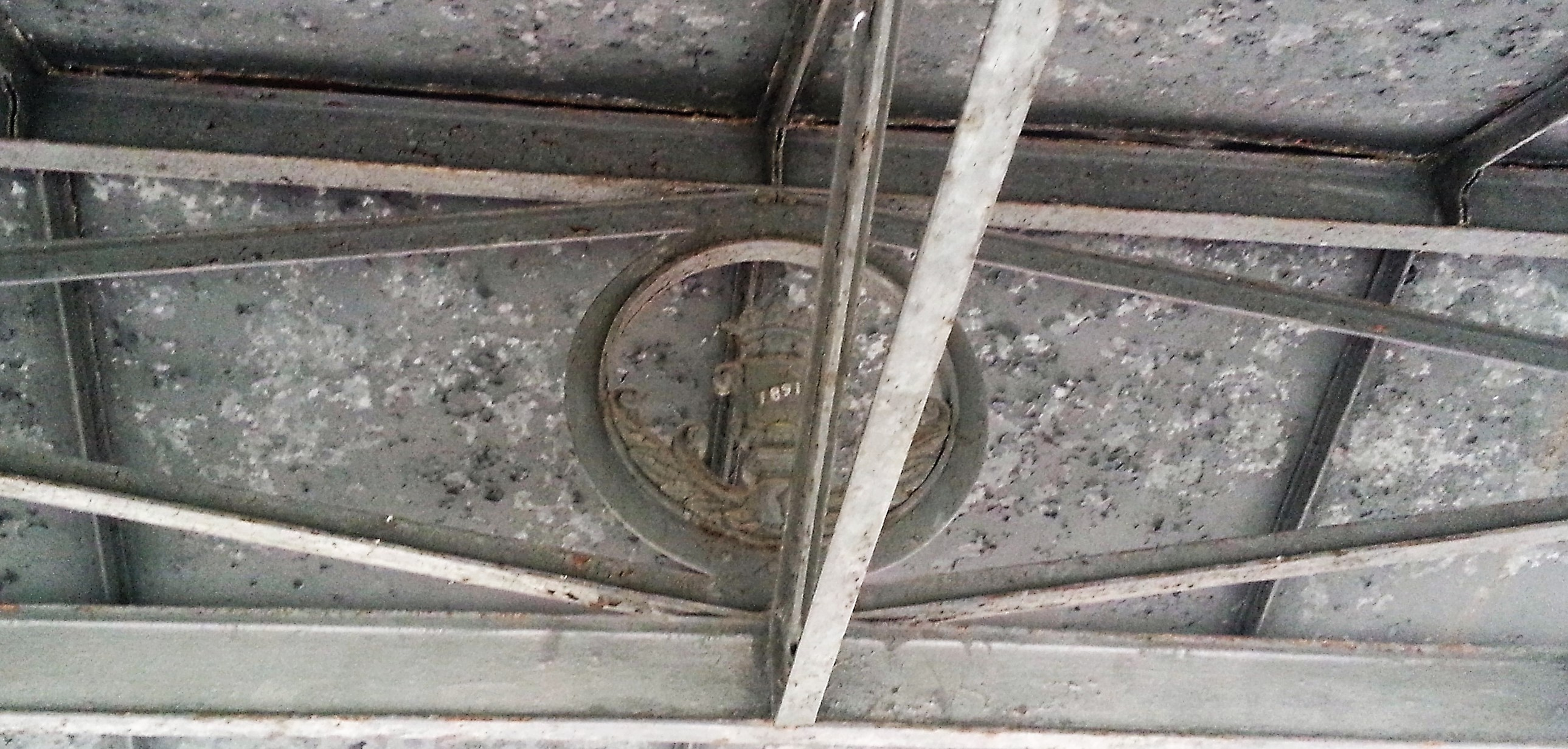 Lata 1891 di posa del lavatorio